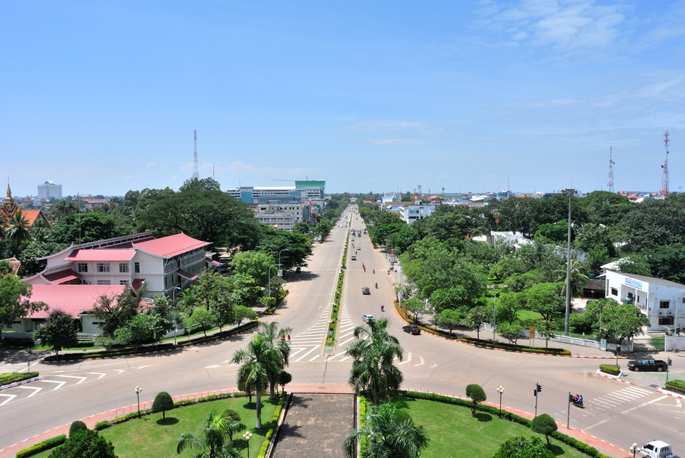 Nikon 1 J1